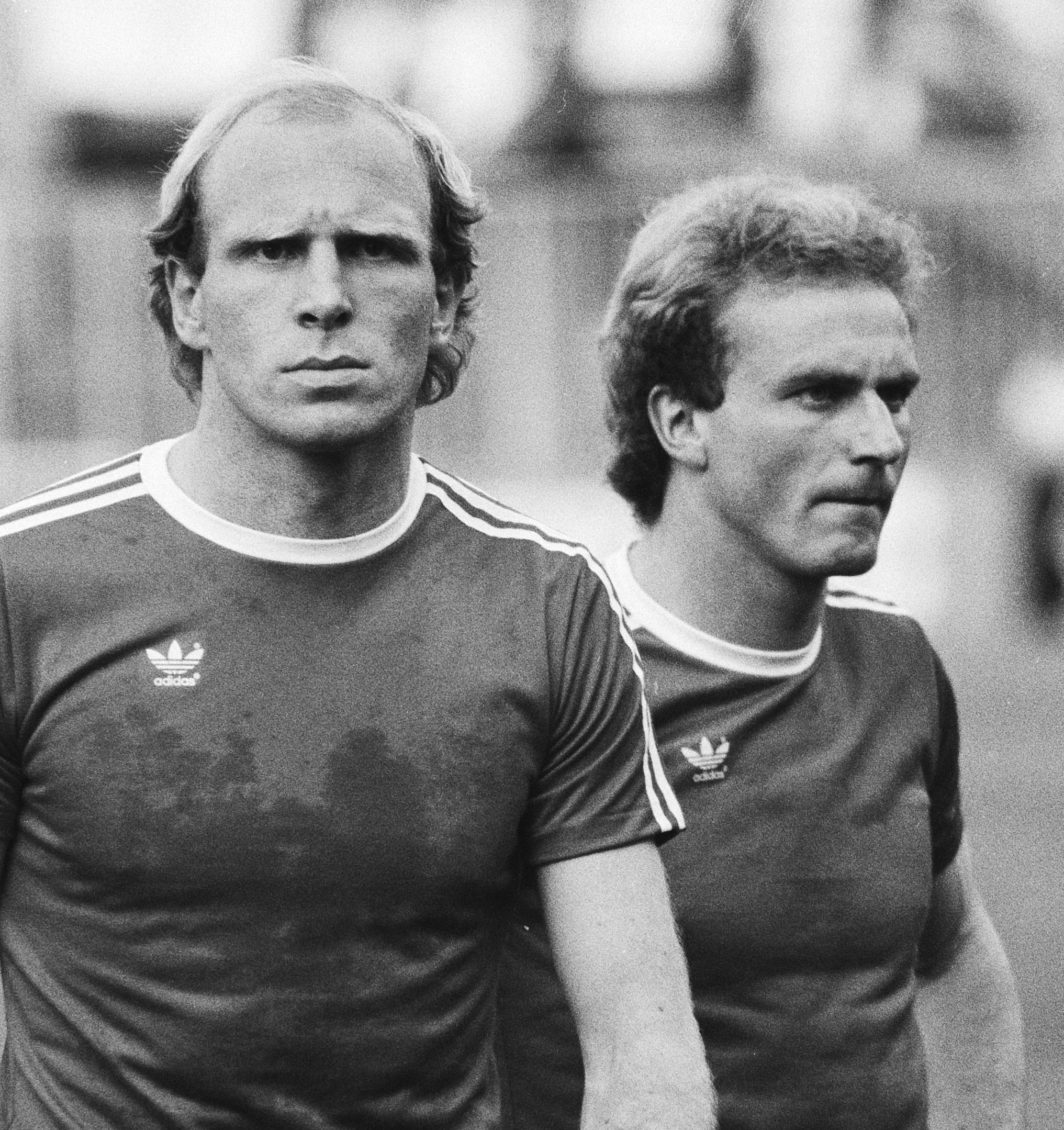 Collectie / Archief : Fotocollectie Anefo Reportage / Serie : [ onbekend ] Beschrijving : FC Bayern Munchen tegen Aston Villa 0-1 Europa Cup I 11a: Rummennige, close, 12a: Rummennige (r) en Hoeness, close, 13a, 14a: Rummennige (l) en Breitner (r), close / Datum : 26 mei 1982 Trefwoorden : sport, voetbal Persoonsnaam : Aston Villa, Fc Bayern Munchen Fotograaf : Antonisse, Marcel / Anefo Auteursrechthebbende : Nationaal Archief Materiaalsoort : Negatief (zwart/wit) Nummer archiefinventaris : bekijk toegang 2.24.01.05 Bestanddeelnummer : 932-1817